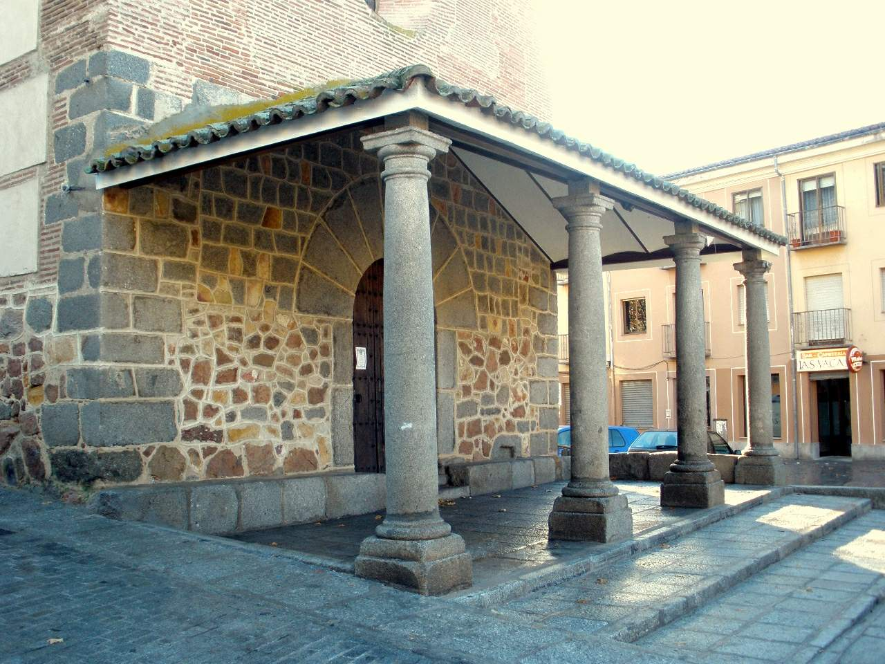 Avila - Ermita de Nuestra Señora de las Vacas